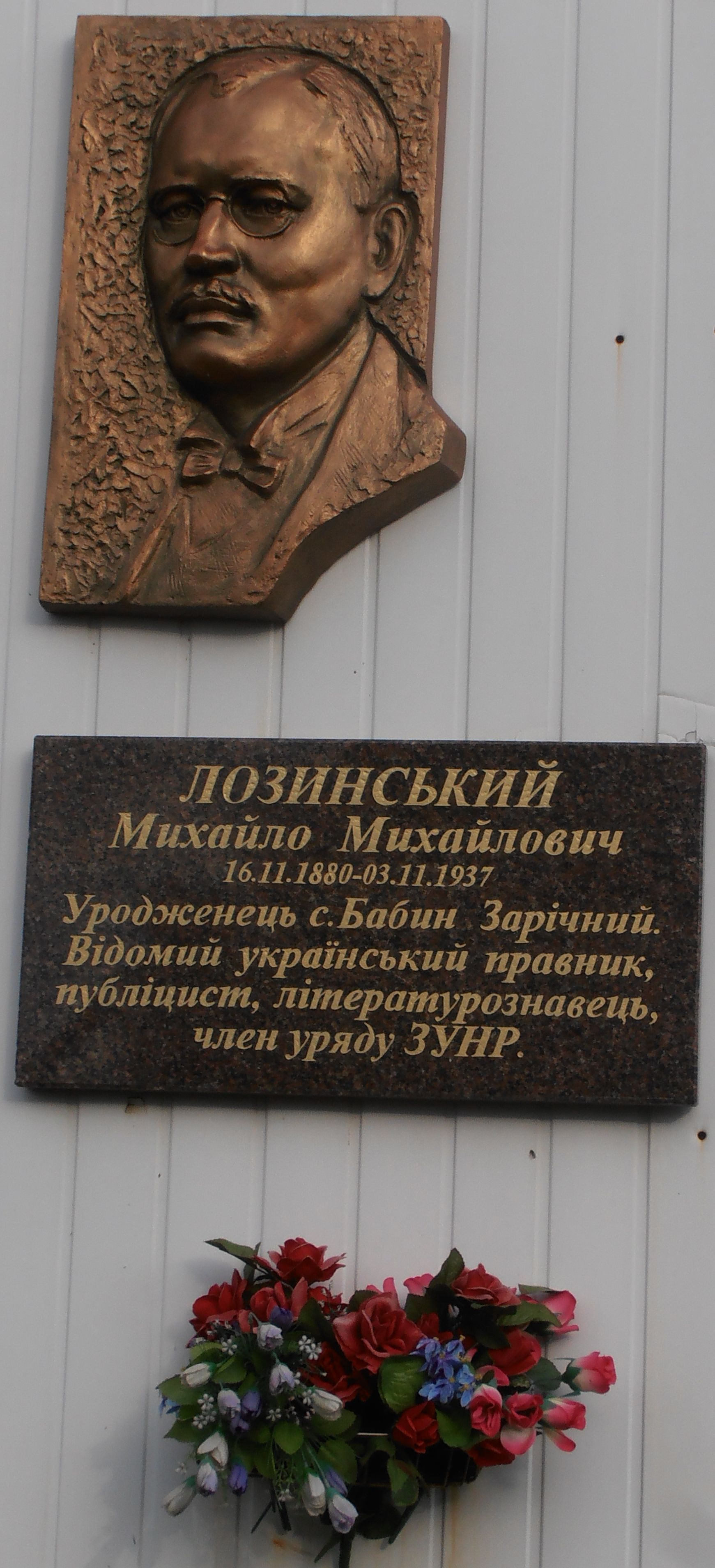 Меморіальна дошка М.М. Лолинському